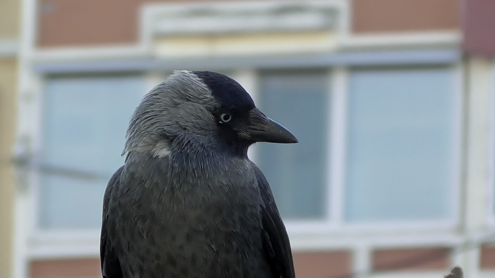 Jackdaw